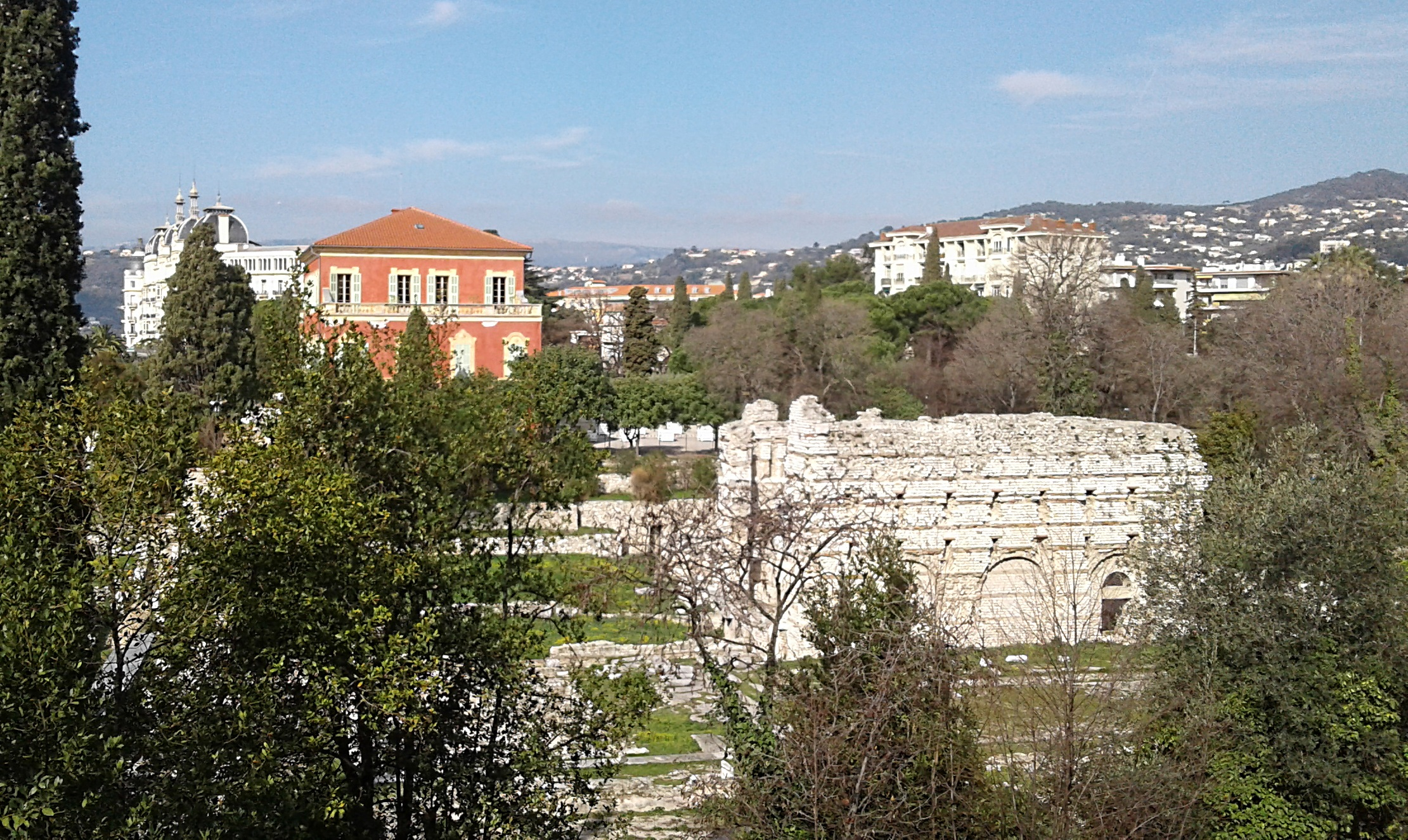 Sommet de la colline de Cimiez, Nice, France : Les thermes romains, le musée Matisse et le Régina.